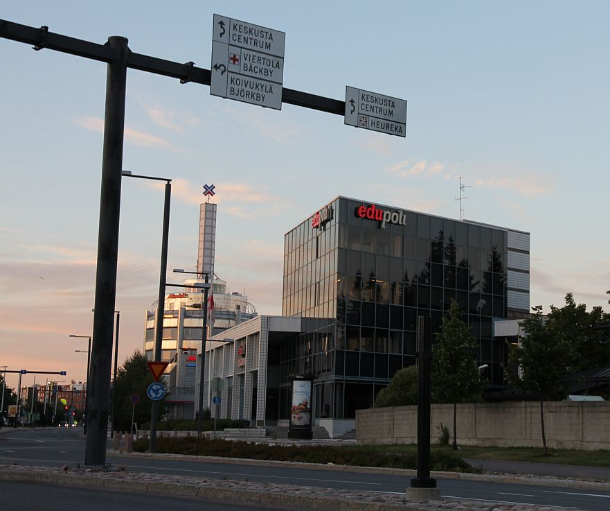 Aikuiskoulutuskeskus Edupolin rakennus Vantaan Tikkurilassa (Virnatie 5 A, 01300 Vantaa). Huom: Muista säilyttää viittaus kuvaajaan, mikäli käytät kuvaa.